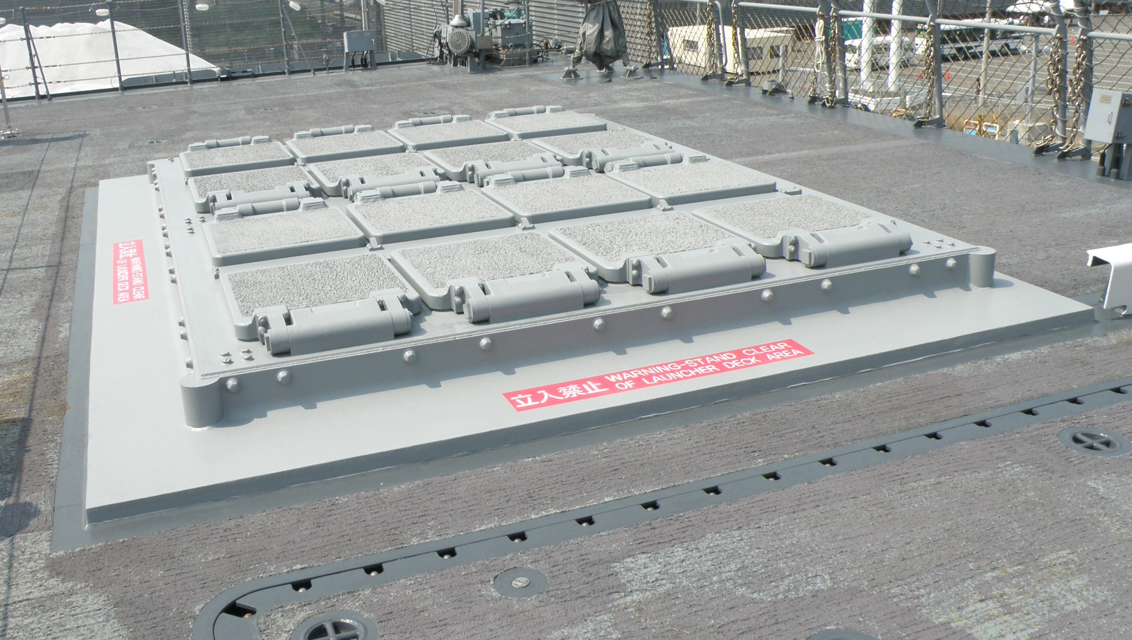 護衛艦ひゅうがの飛行甲板にあるMk41垂直発射システム。四日市港での一般公開中に撮影。